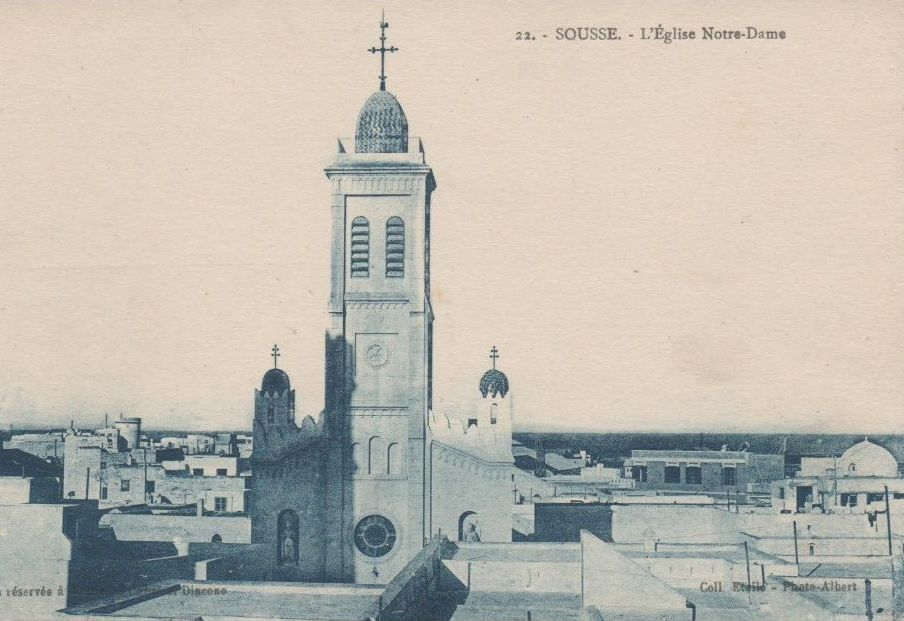 Eglise Notre Dame de l'Immaculée Conception de Sousse vers 1922